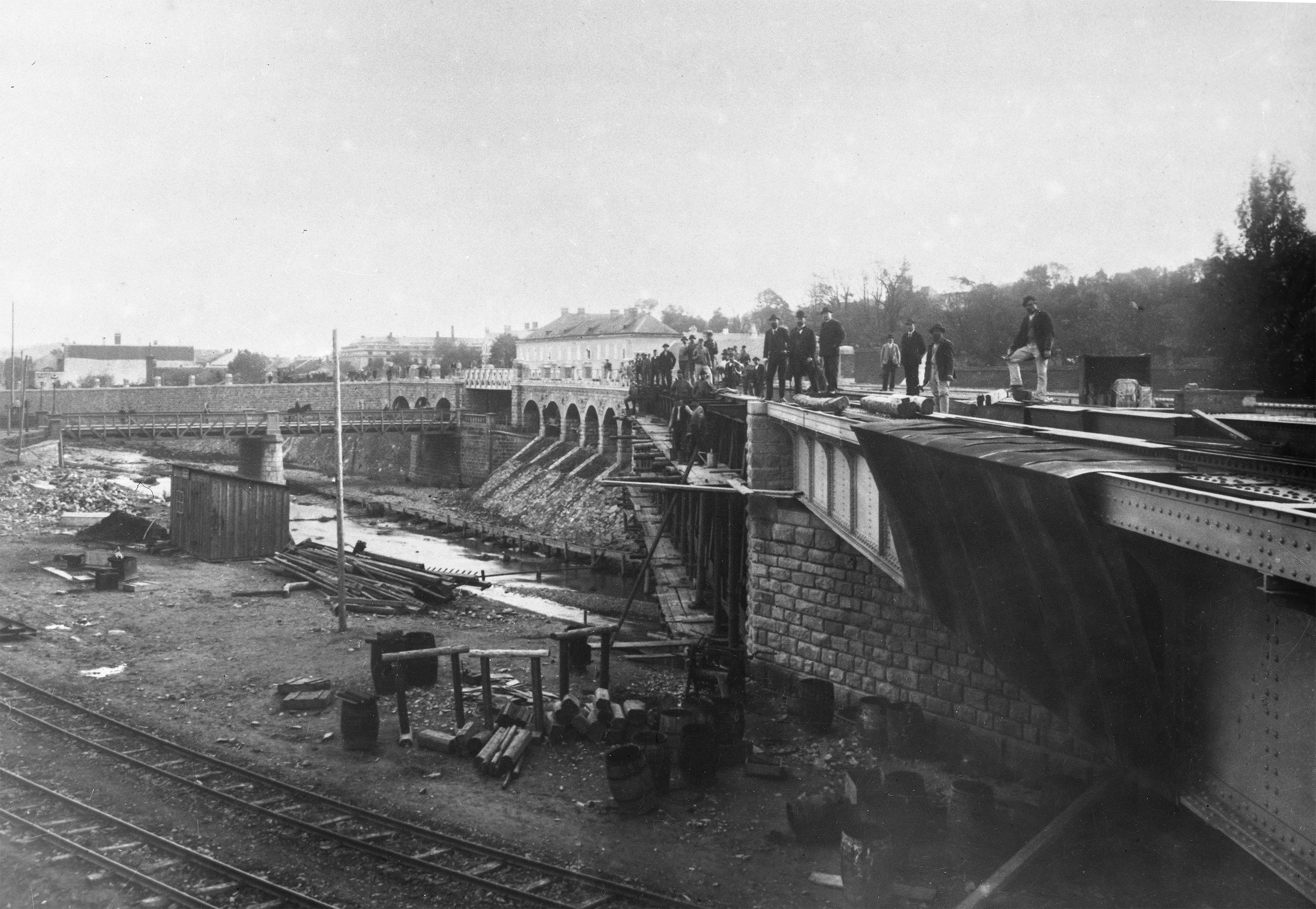 Brücke über den Wienfluss bei Hütteldorf(Original text: «Bau der Stadtbahn / Umbau auf elektrischen Betrieb der Stadtbahn in Hütteldorf um 1920»)